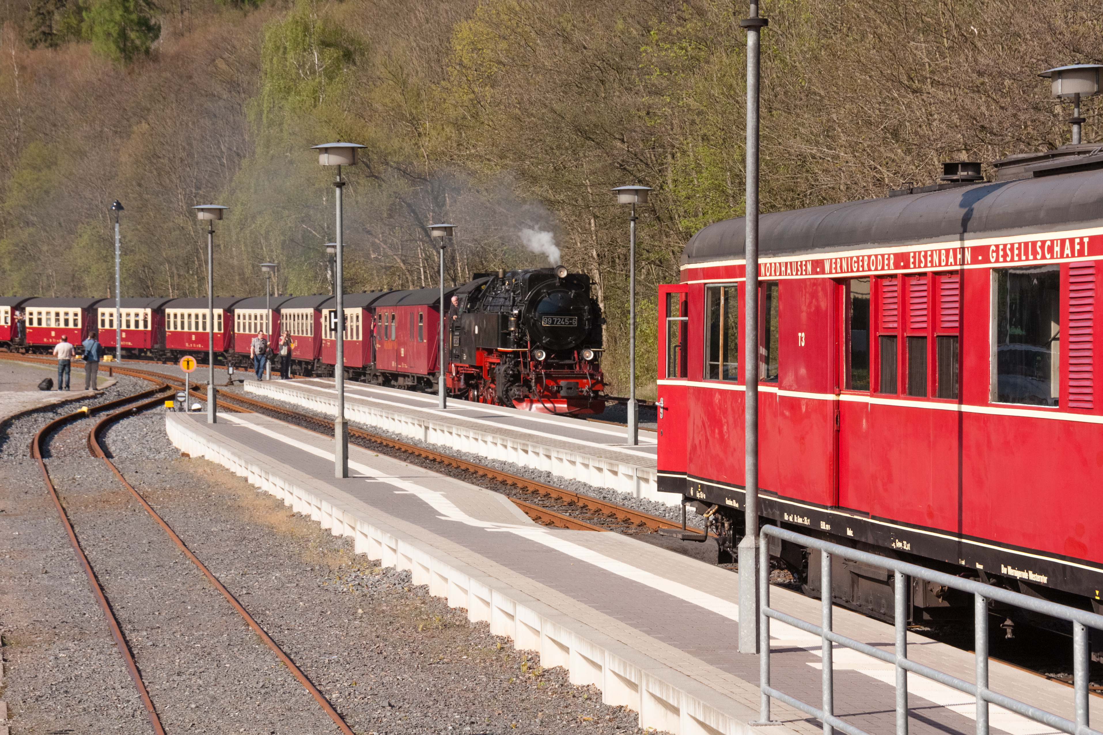 Zugkreuzung in Ilfeld